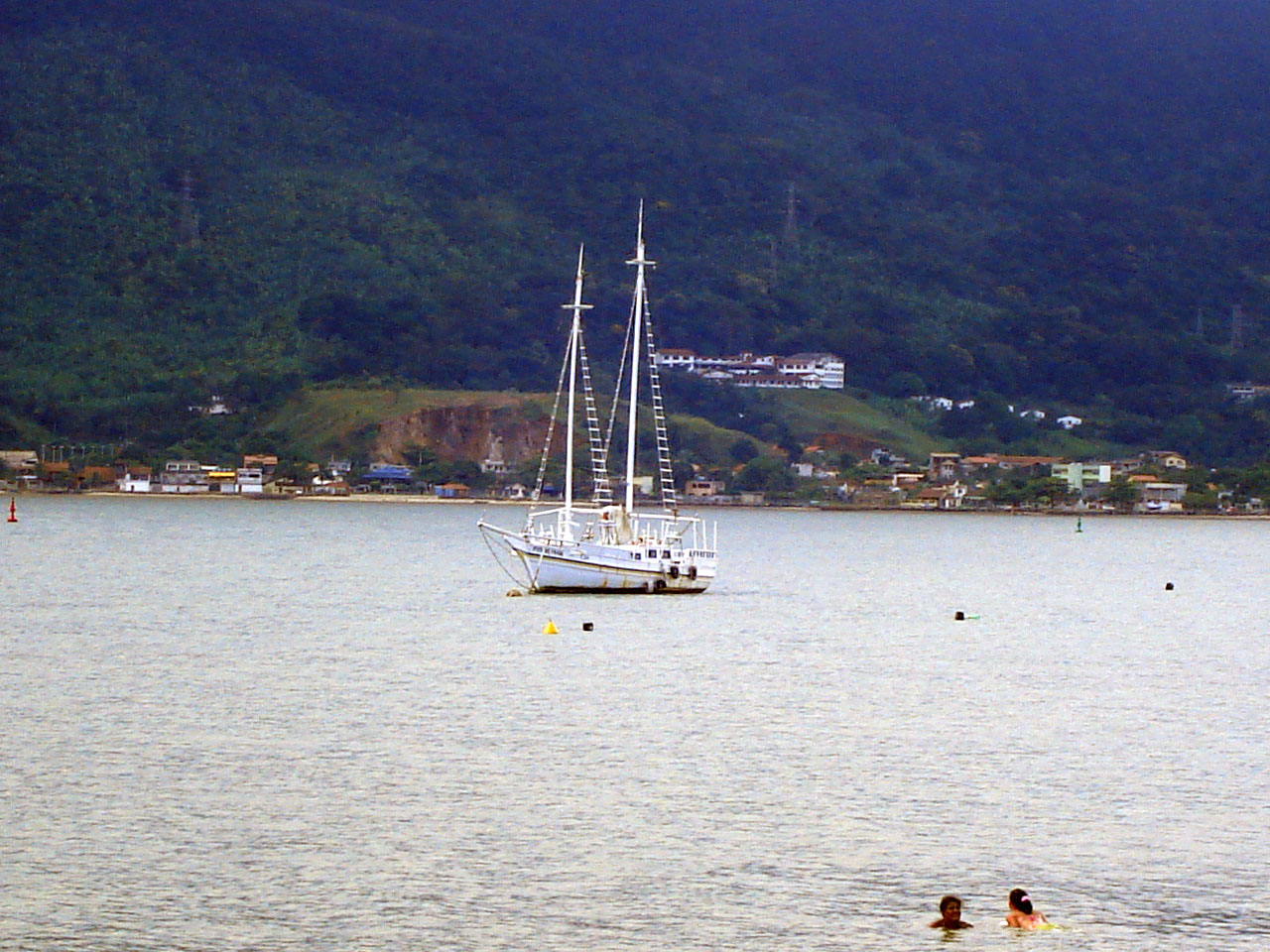 Saveiro